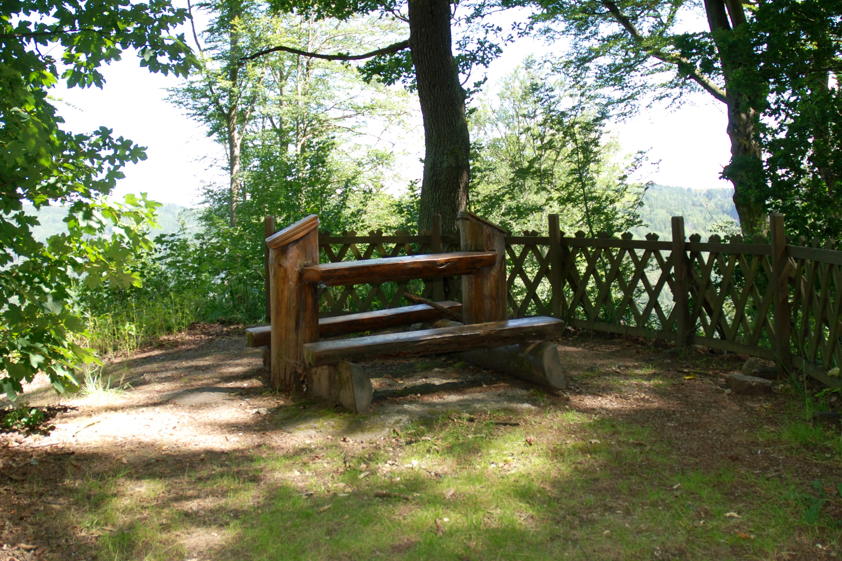 Páralovo sedátko u chaty Rusalka v karlovarských lesích